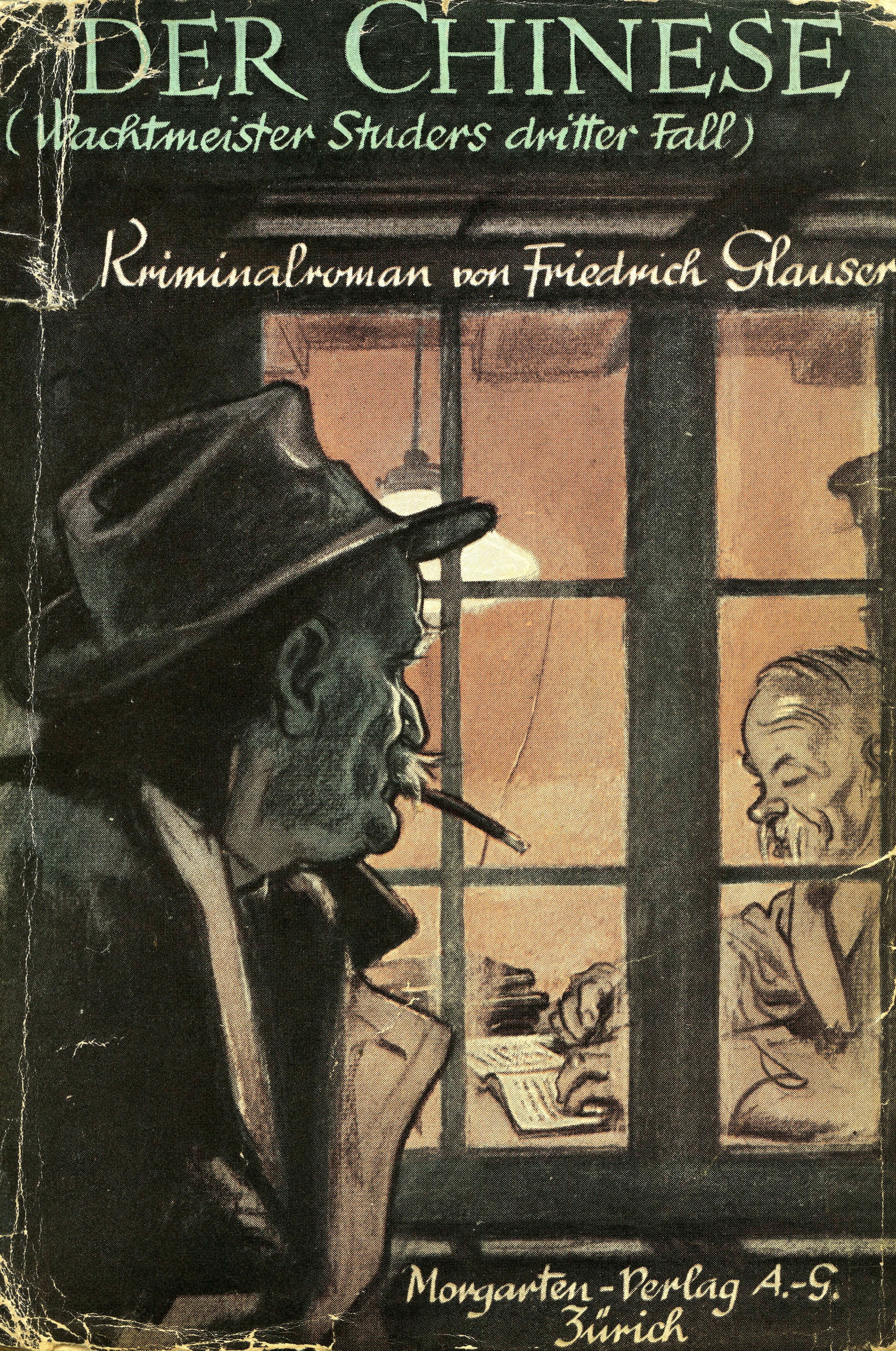 „Der Chinese“ in der Buchausgabe des Morgarten-Verlags, Zürich 1939. Verlag wurde übernommen vom Oesch Verlag, Zürich. Umschlagentwurf: H. Schaad